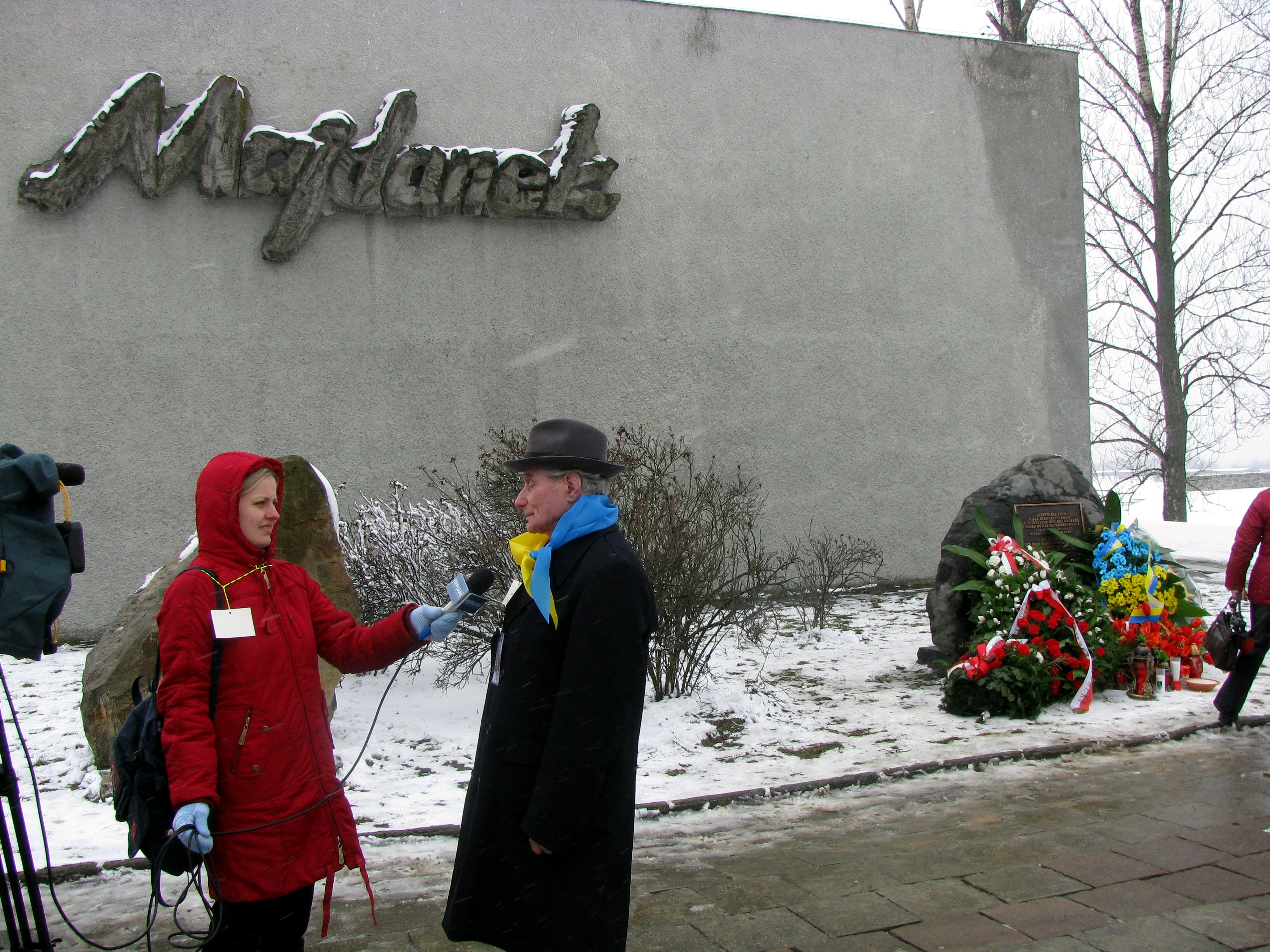 Проща на "Майданек", Інтерв'ю для Першого національного каналу українського телебачення